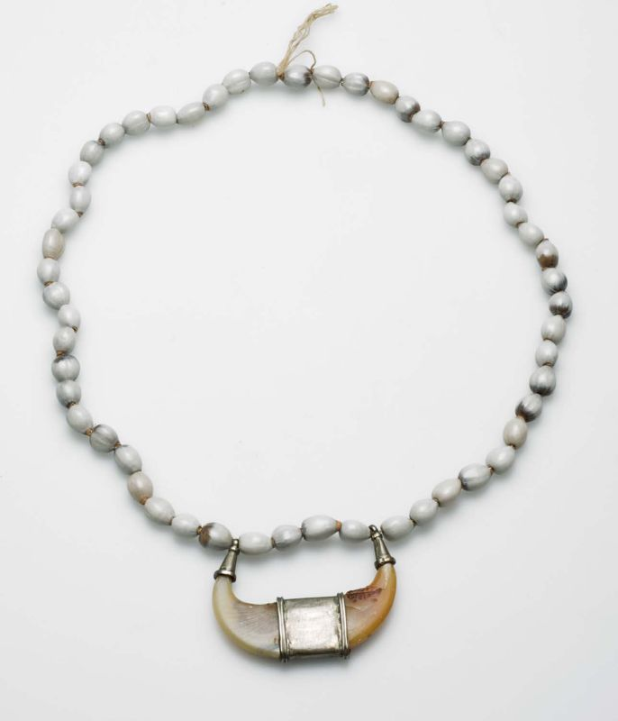 Halssieraad. Een ketting met mogelijk een beschermende functie. Halsketting van coixpitten en tijgernagels.